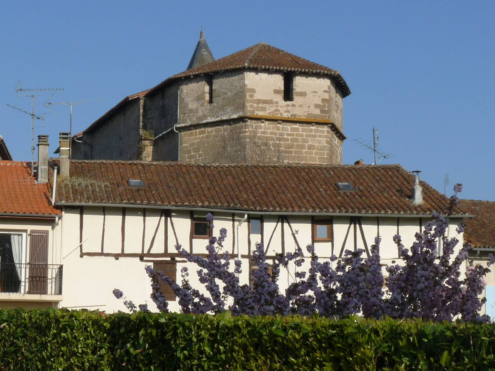 Eglise d'Ansac vue du pont sur la Vienne, Charente, France